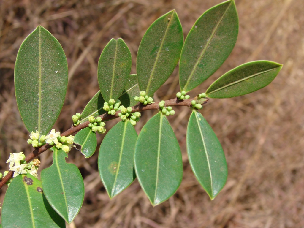 Erythroxylum citrifolium -ERYTHROXYLACEAE - Parque Olhos D'Água - Brasília - Distrito Federal - Brasil.